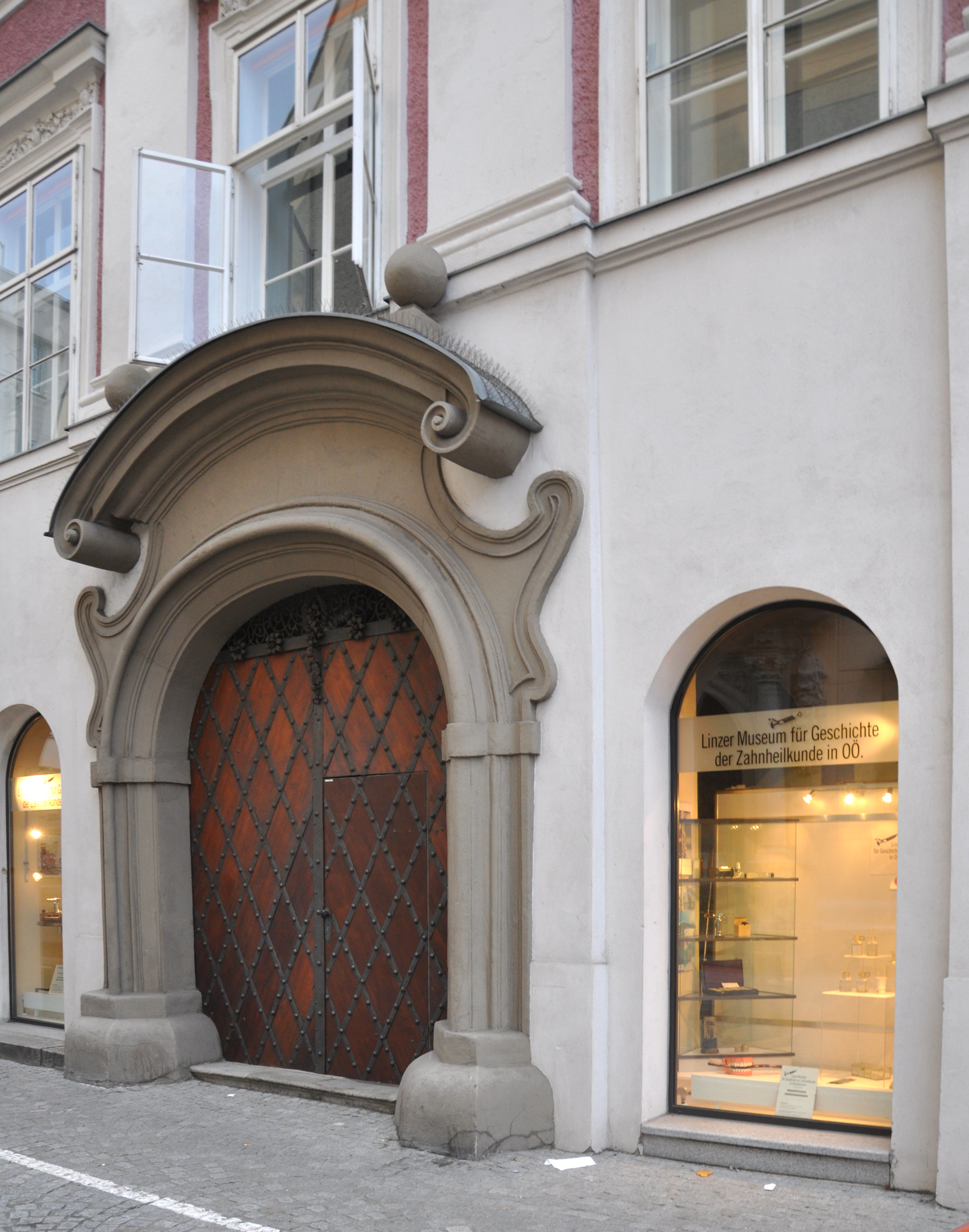 Linz, Linzer Museum für Geschichte der Zahnheilkunde in Oberösterreich